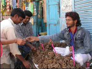 बीकानेर में भरभोलियों की दूकान